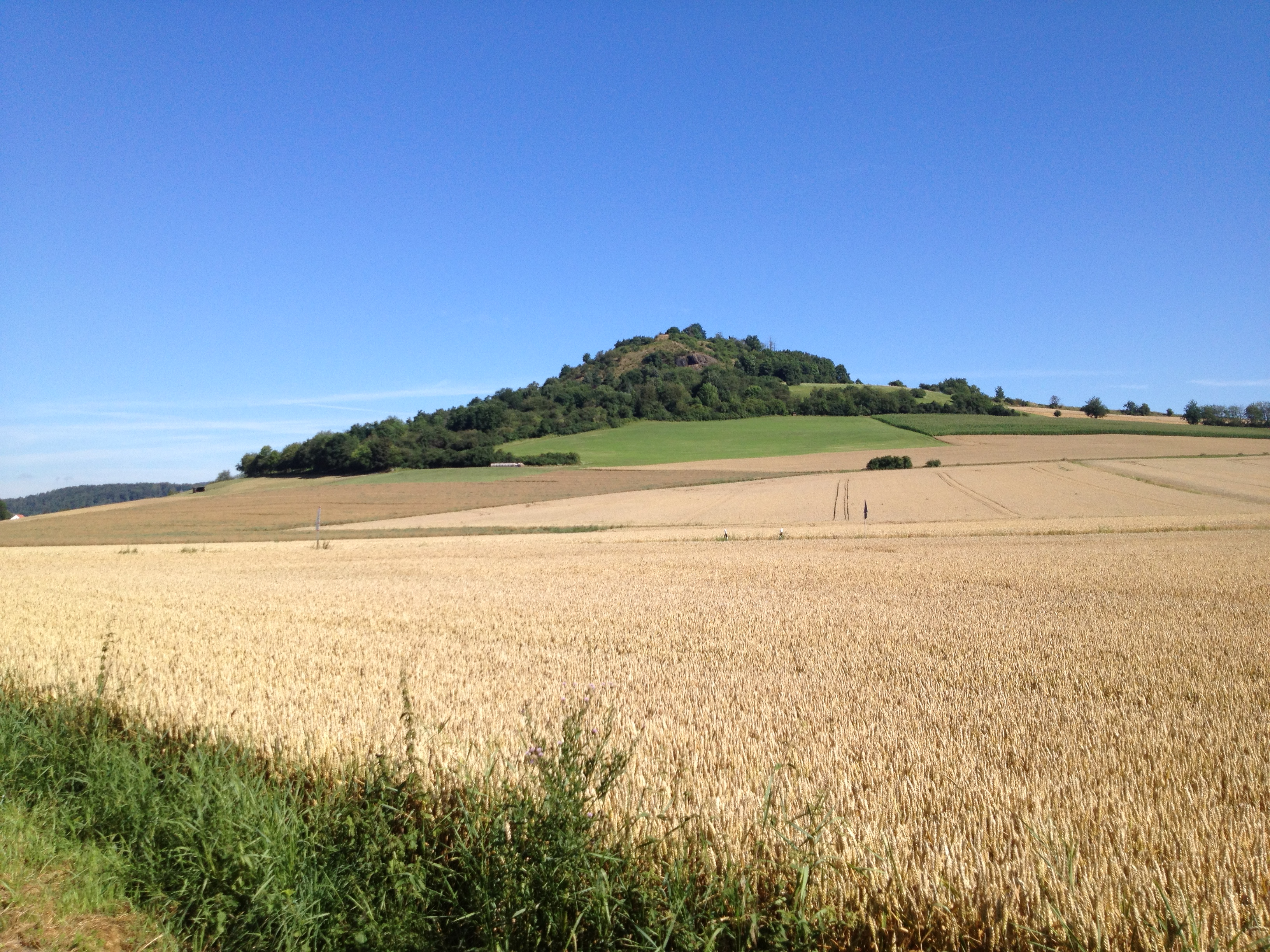 Blick vom Chatten-Fulda-Weg auf den Wartberg bei Kirchberg